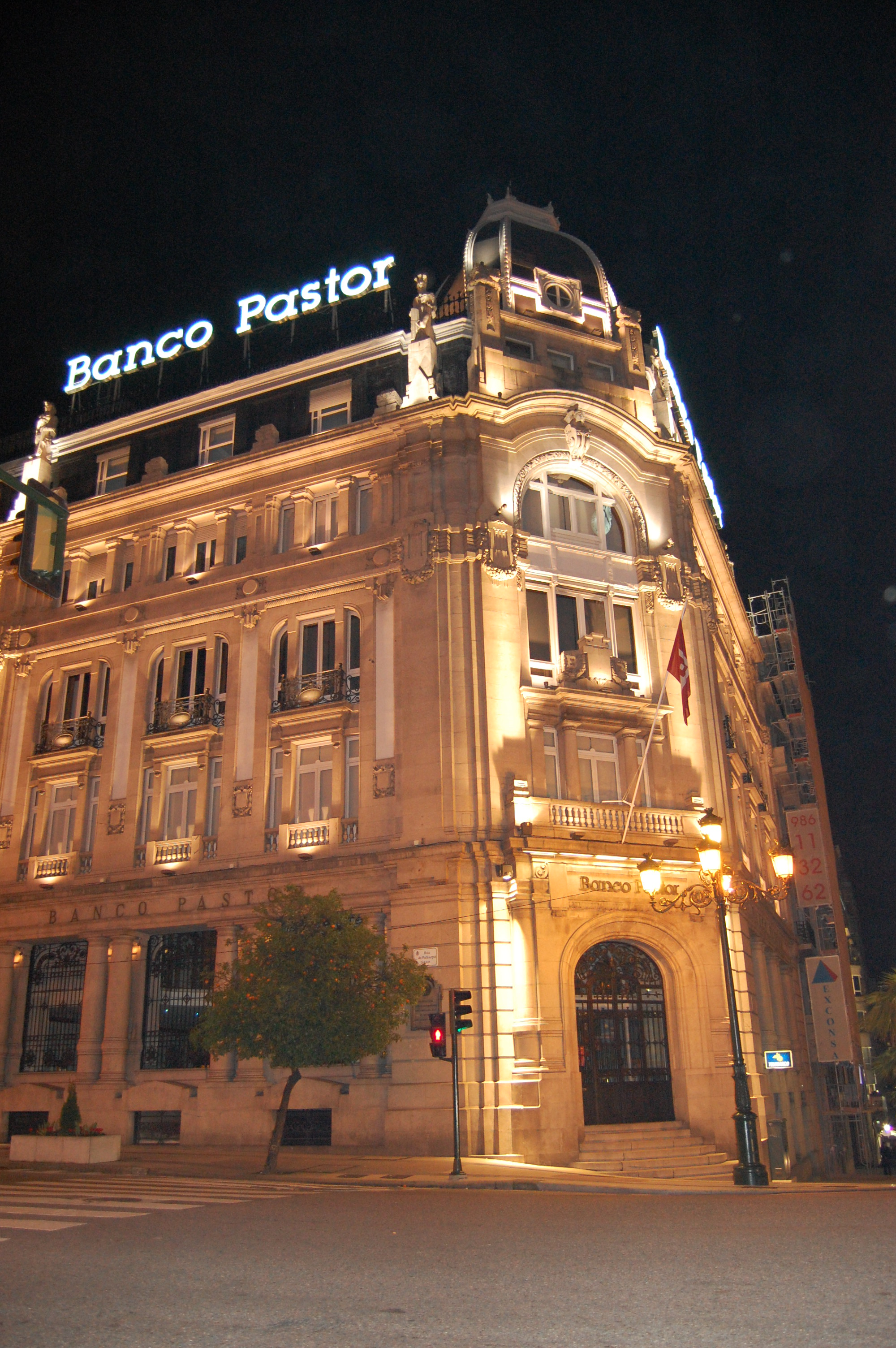 Sede do Banco Pastor de Vigo.